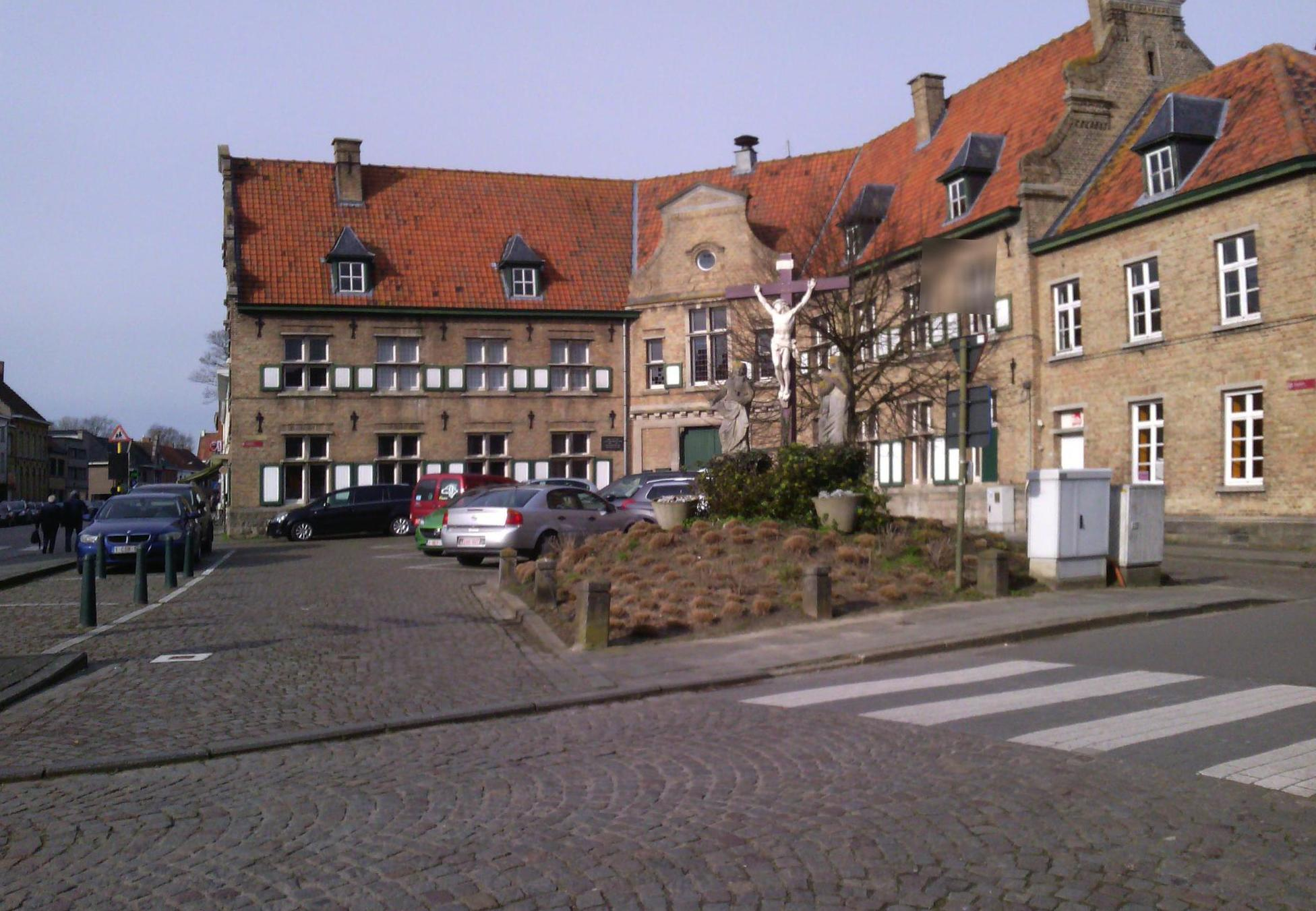 Sixplein, Vlamertinghe, Belgium